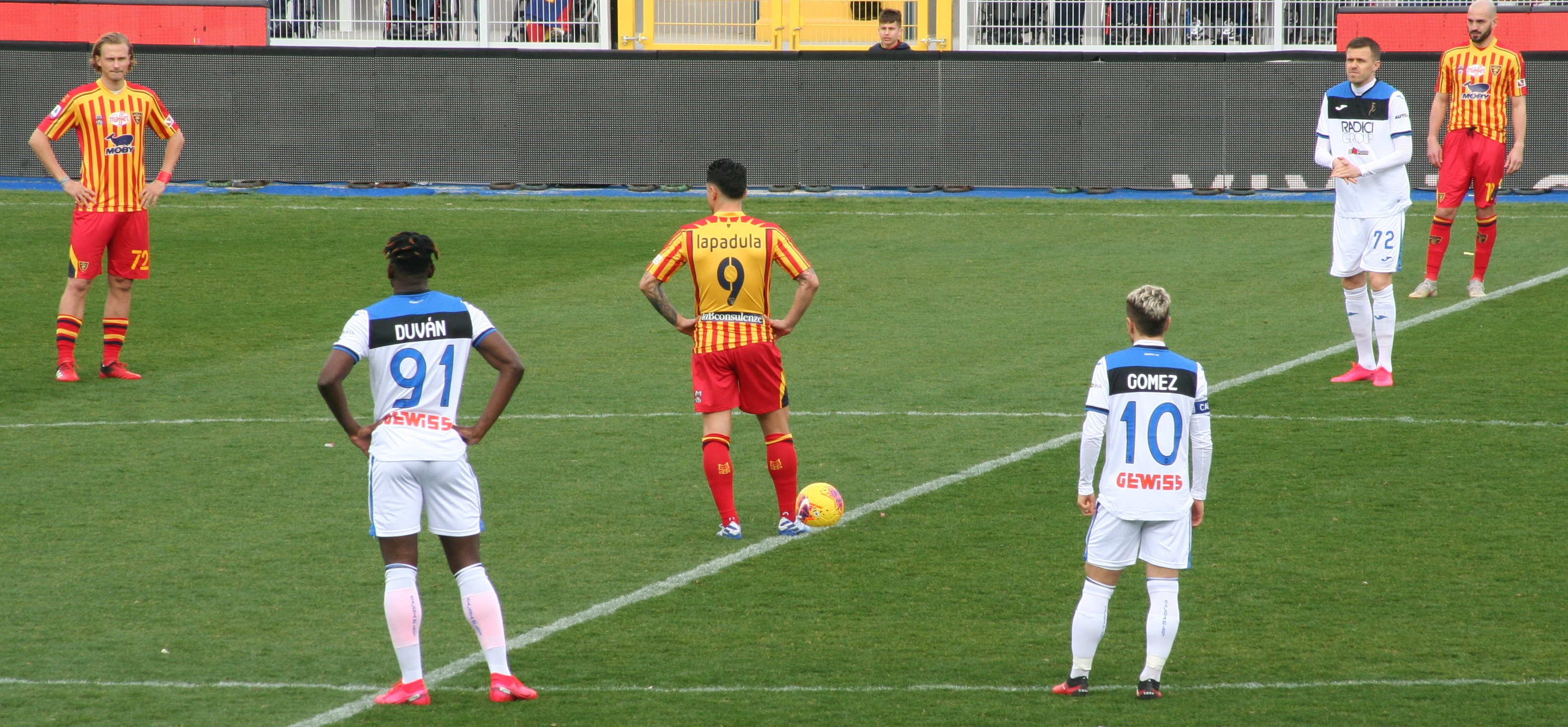 Calcio di inizio della partita Lecce-Atalanta, disputata a Lecce il 1° marzo 2020